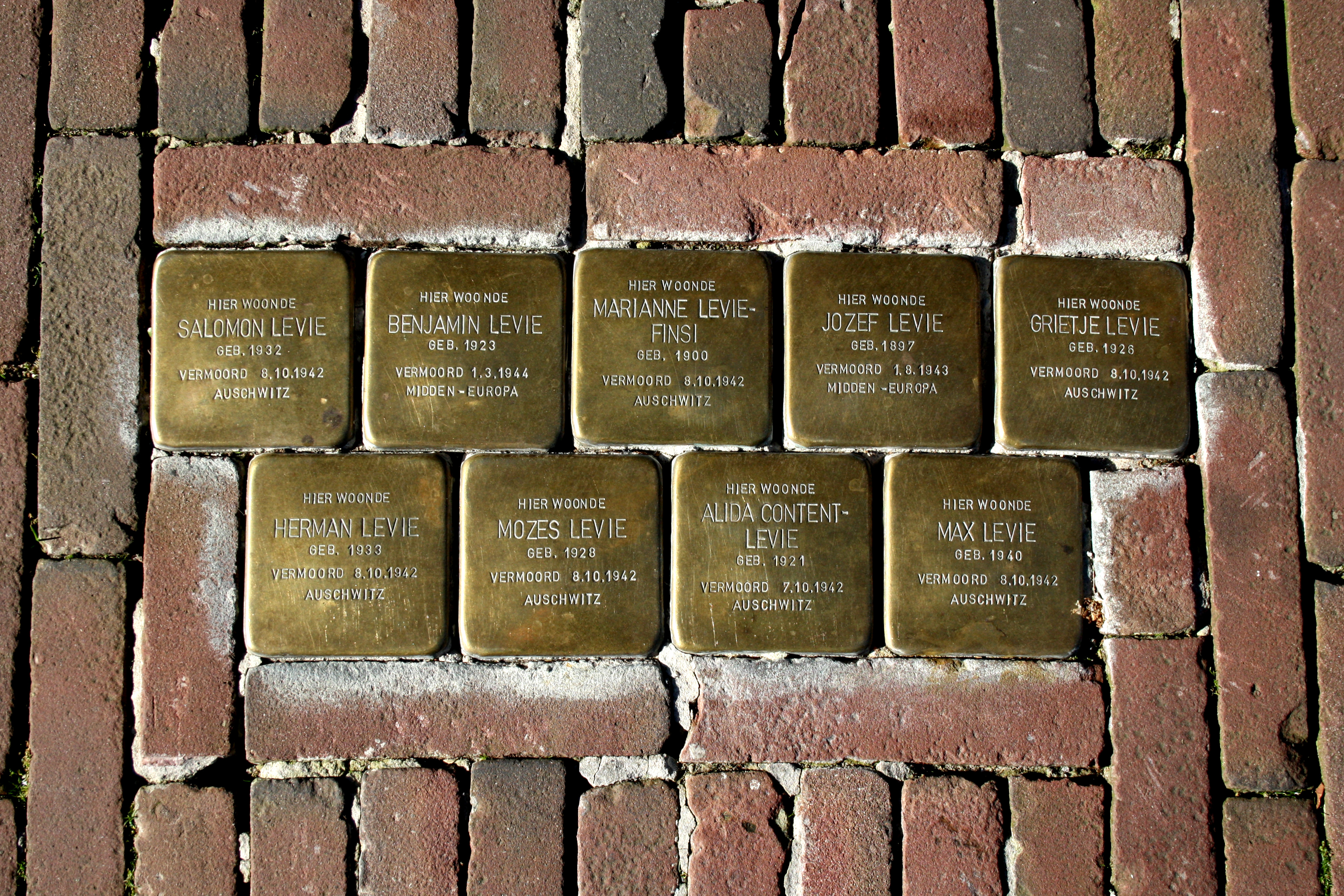 Meppel - Stolpersteinen - 2012 - Hoofdstraat 24 ארים ראשי Jozef Levie Geboren 11 januari 1897 Meppel Vermoord augustus 1943 Midden-Europa Marianne Levie-Finsi Geboren 17 september 1900 Amsterdam Vermoord 8 oktober 1942 Auschwitz Alida Content-Levie Geboren 11 november 1921 Meppel Vermoord 7 oktober 1942 Auschwitz Benjamin Levie Geboren 3 februari 1923 Meppel Vermoord maart 1944 Midden-Europa Grietje Levie Geboren 6 november 1926 Meppel Vermoord 8 oktober 1942 Auschwitz Mozes Levie Geboren 24 september 1928 Meppel Vermoord 8 oktober 1942 Auschwitz Salomon Levie Geboren 1 februari 1932 Meppel Vermoord 8 oktober 1942 Auschwitz Herman Levie Geboren 12 juli 1933 Zwolle Vermoord 8 oktober 1942 Auschwitz Max Levie Geboren 6 juni 1940 Meppel Vermoord 8 oktober 1942 Auschwitz